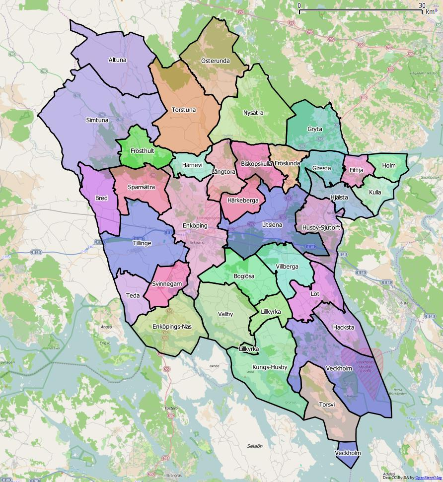 Distriktsindelningen i Enköpings kommun